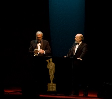 Daniel y Marcos en el papel de Murena y Ramirez